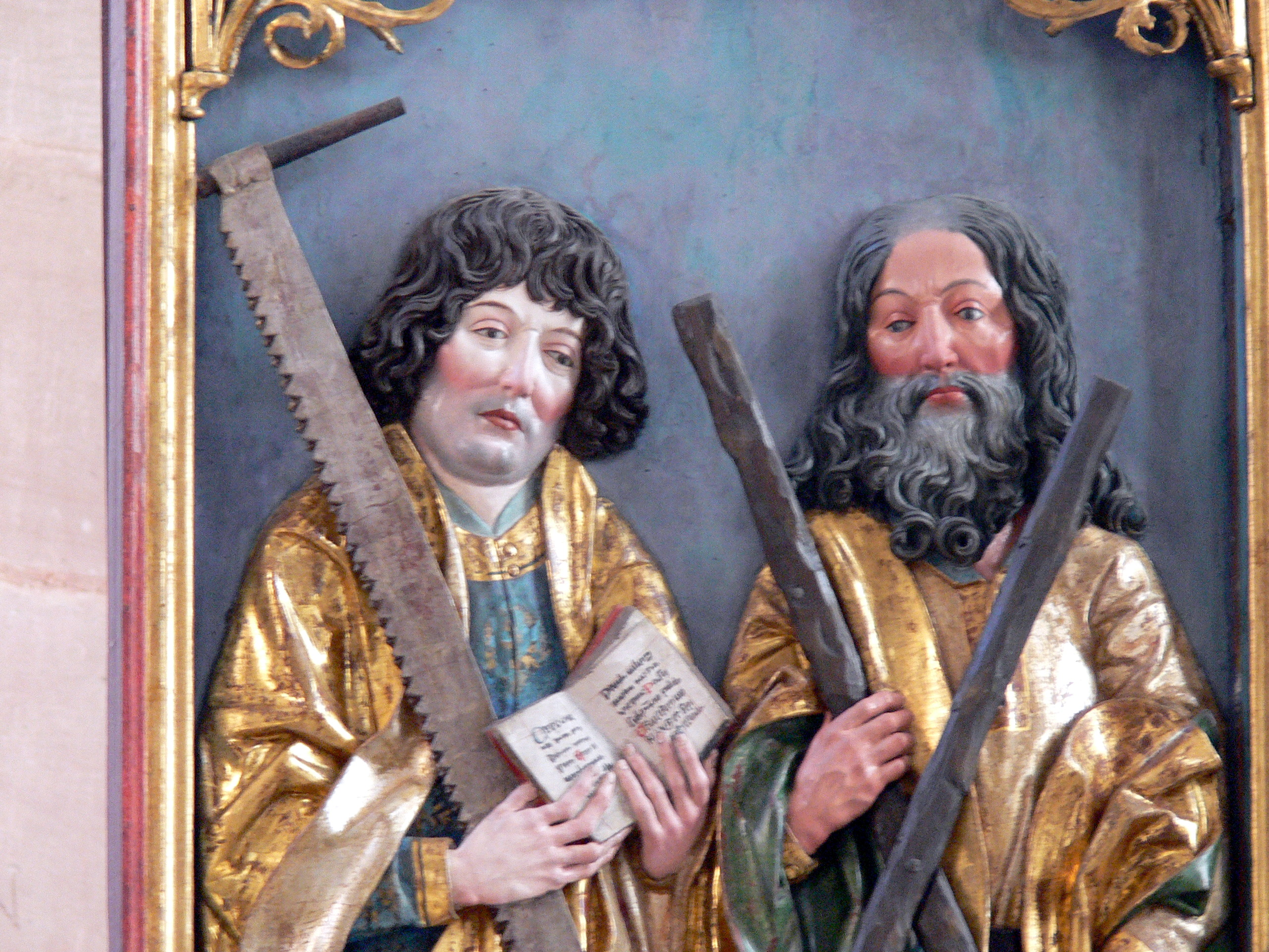 Münster in Heilsbronn. Hochaltar von 1504: Die Apostel Simon und Andreas am linken Seitenflügel